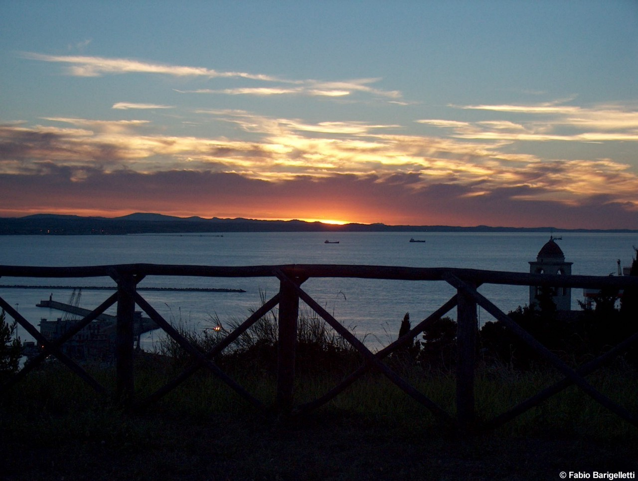 Ancona, Tramonto sul golfo visto dall'ex Batteria del Semaforo